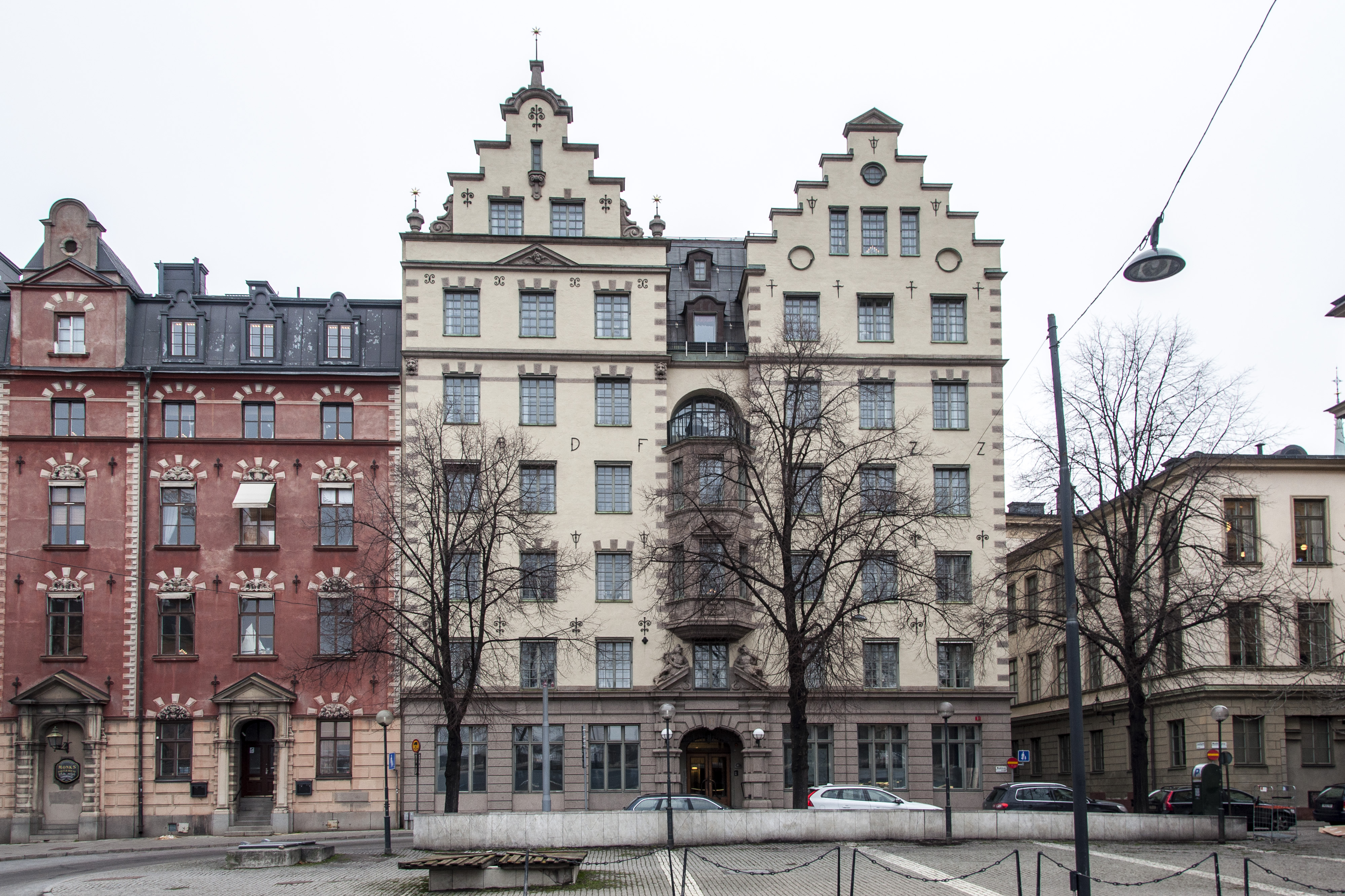 Munkbron 17. kv. Aurora 2. Byggnadsår 1921-22. arkitekt Erik Josephson. Byggherre Livförsäkringsaktiebolaget De förenade